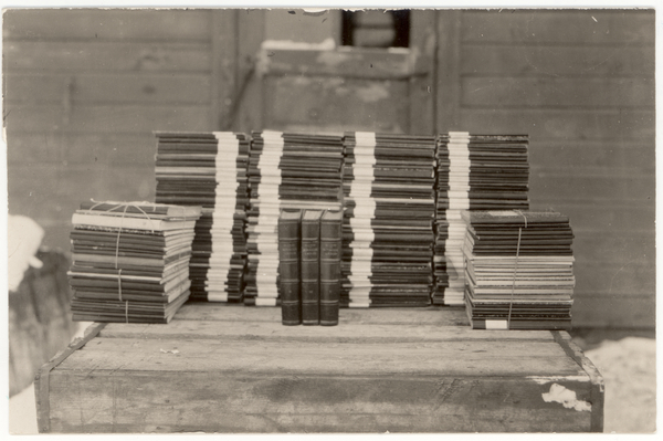 Коллекция фольклора Сето, 1932